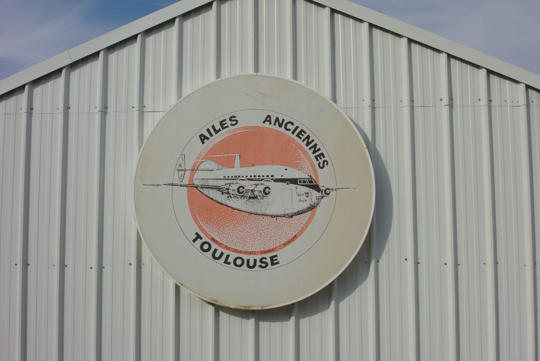 Logo des Ailes anciennes à Toulouse (France).